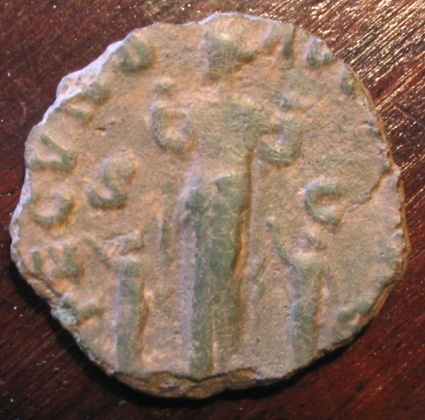 Faustine La Jeune Augusta (Revers). Sur cette monnaie c'est une véritable profusion d'enfants qui a été figurée. Faustine, sous les traits de la Fécondité est représentée debout à gauche, tenant deux bébés, et deux autres enfants à ses pieds, FECVND AVGVSTA S-C. Sur cette monnaie, Faustine la Jeune exalte sa fécondité, elle eut treize enfants dont sept dépassèrent l'enfance. Un monnayage très important fut frappé jusqu'à sa mort en 175 à Halala au pied du mont Taurus en Cappadoce. On this coin it is a veritable profusion of children which was represented. Faustina, in the guise of Fertility is represented standing on the left, holding two babies, and two other children at her feet, FECVND AVGVSTA S-C. On this coin, Faustina the Younger exalts her fertility, she had thirteen children, seven of whom survived childhood. A very important coinage was minted until his death in 175 in Halala at the foot of Mount Taurus in Cappadocia.